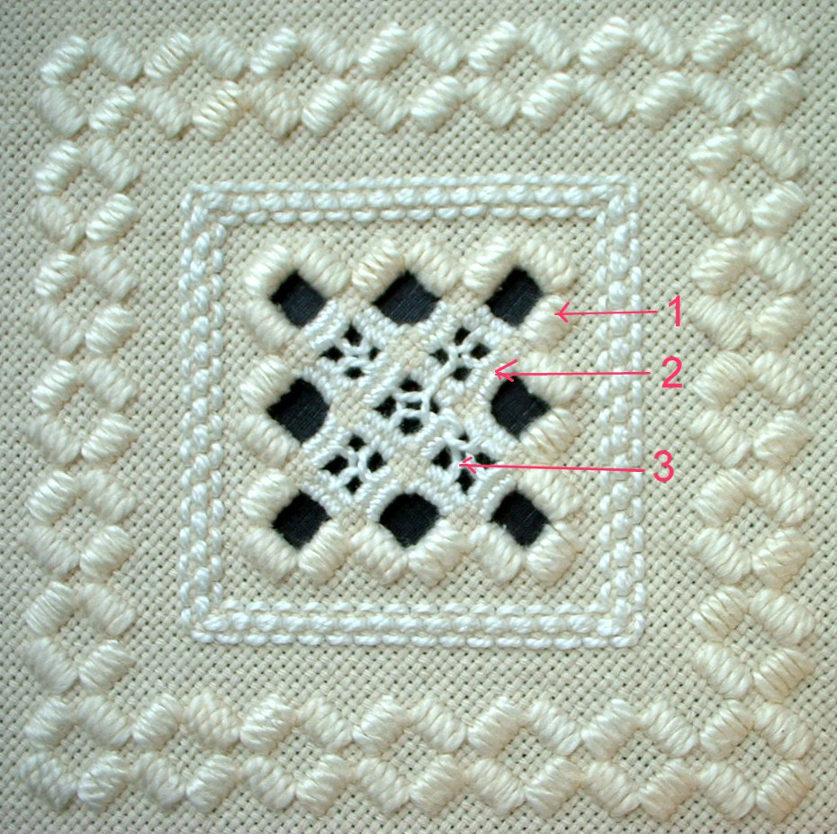 Hardanger-Muster auf einer Tischedecke